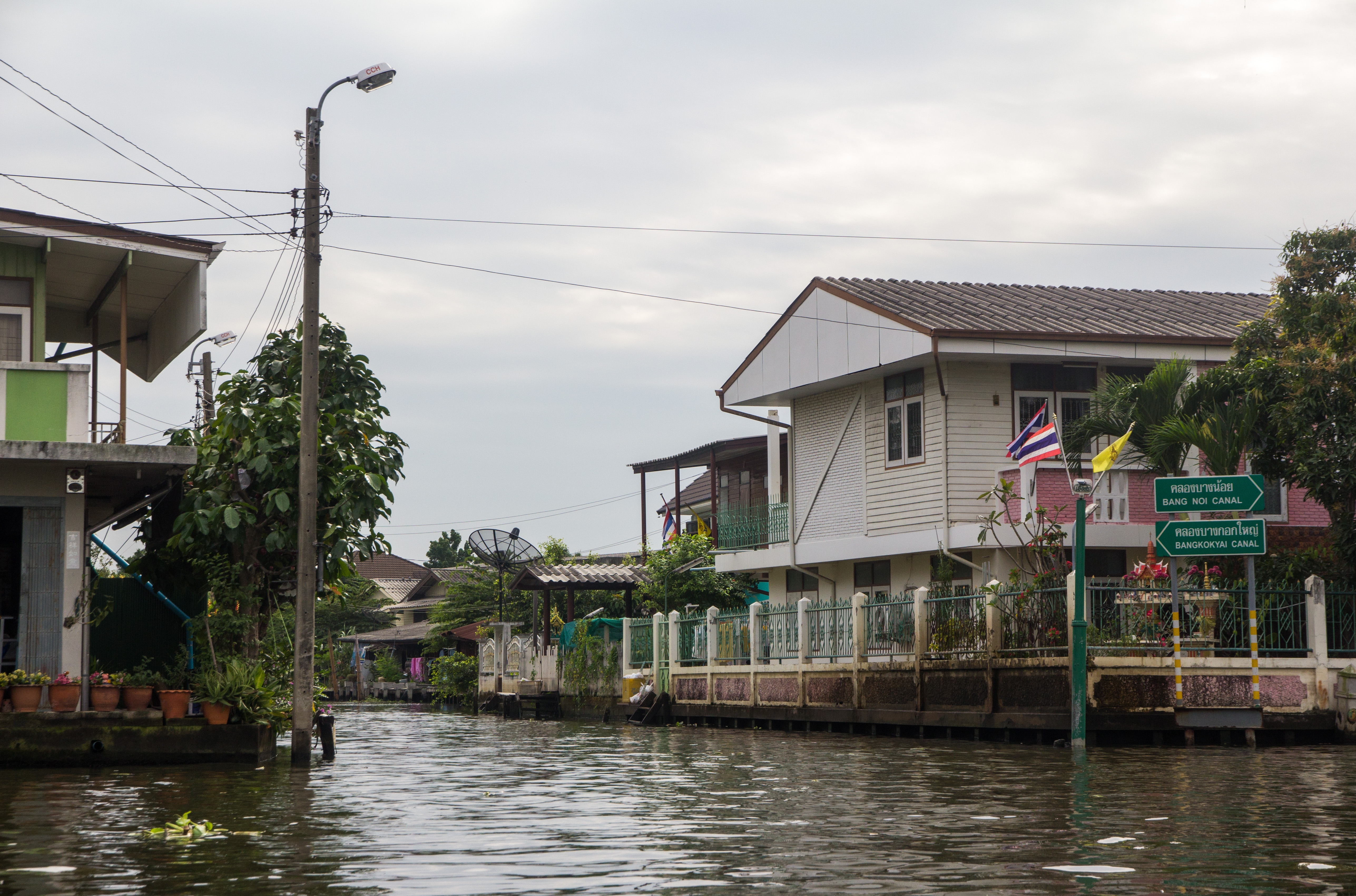 Bang Chueak Nang